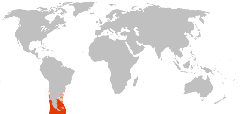 Hábitat de Spheniscus magellanicus